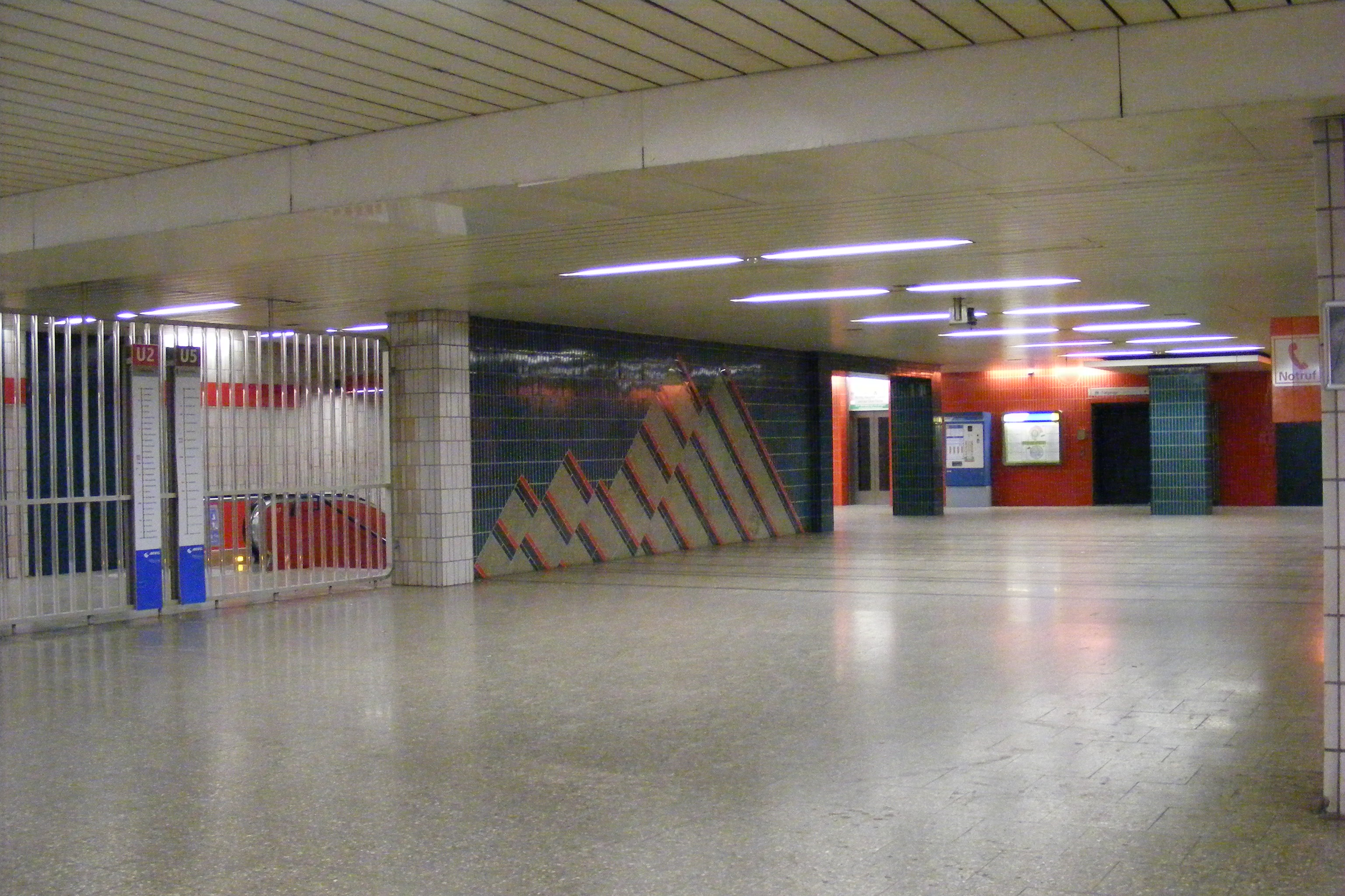 Sperrengeschoss des U-Bahn-Bahnhofes Innsbrucker Ring, München